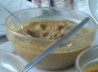 Caril de lulas, um prato goês. Squid curry, a dish from Goa.